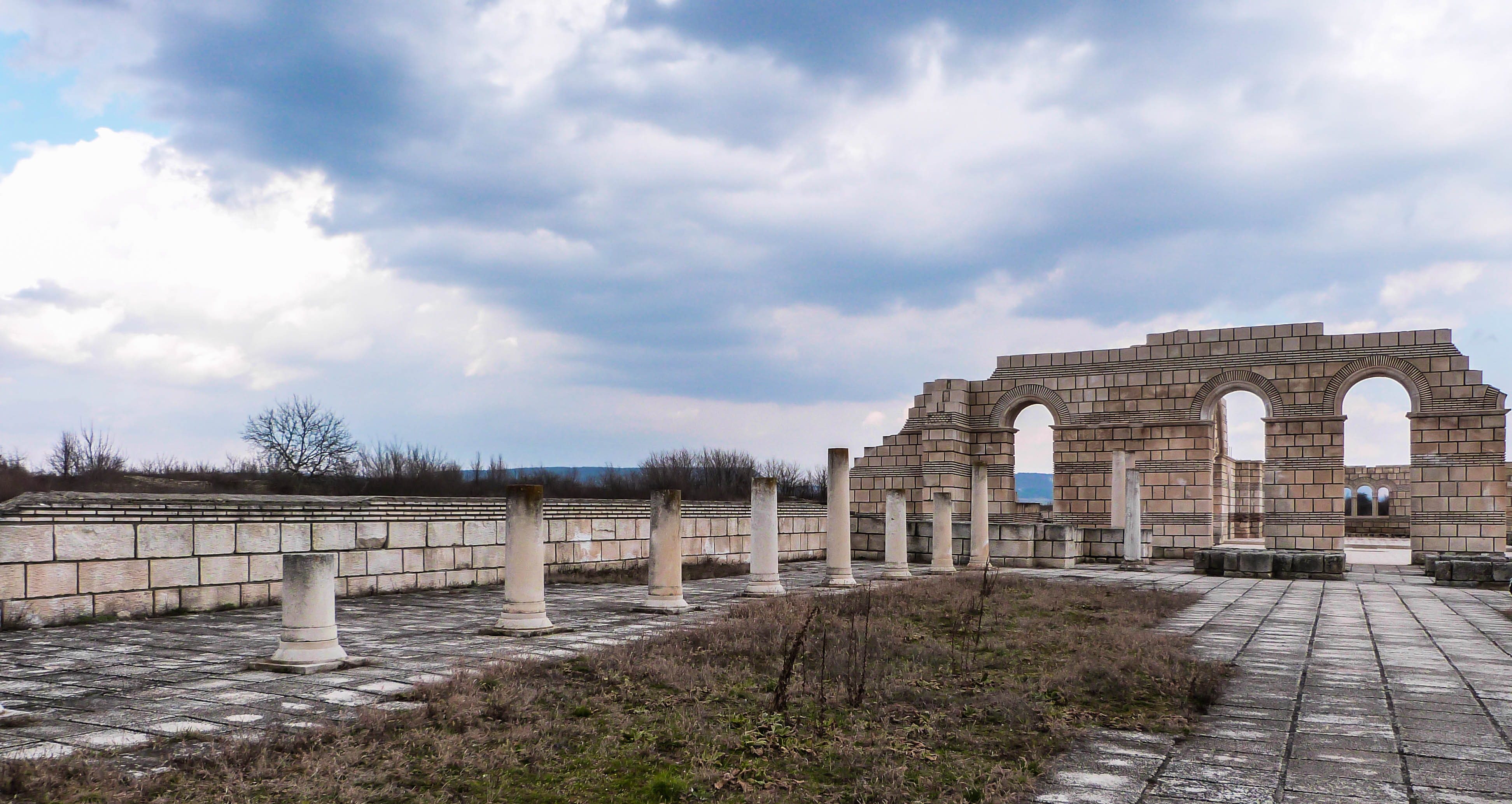 Дворцова църква Плиска